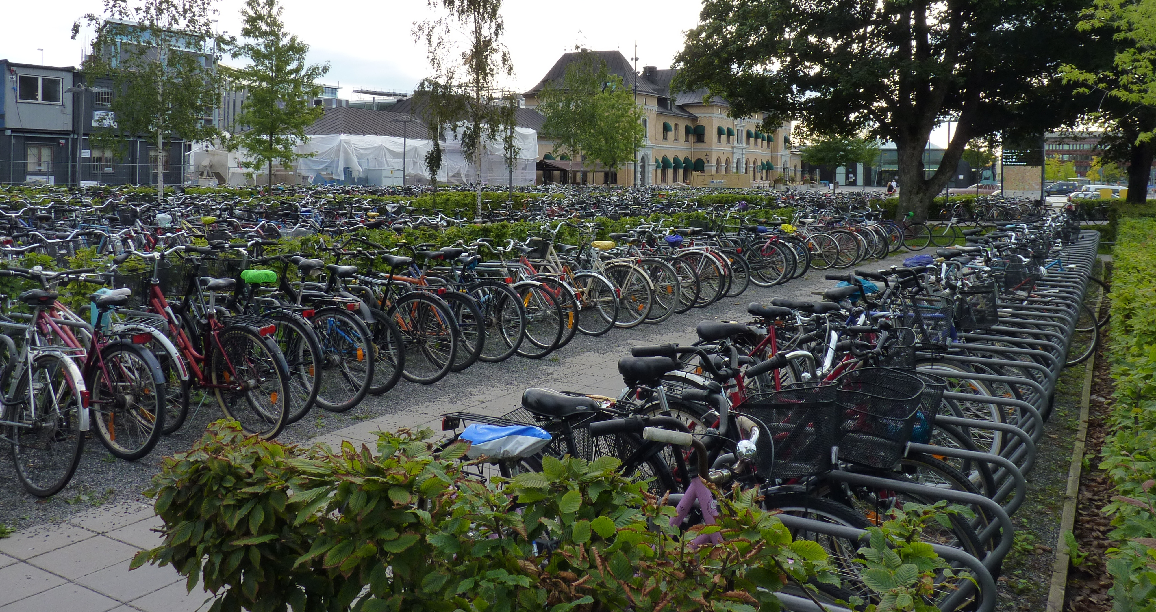 En av flera stora cykelparkerigar vid Uppsala Centralstation